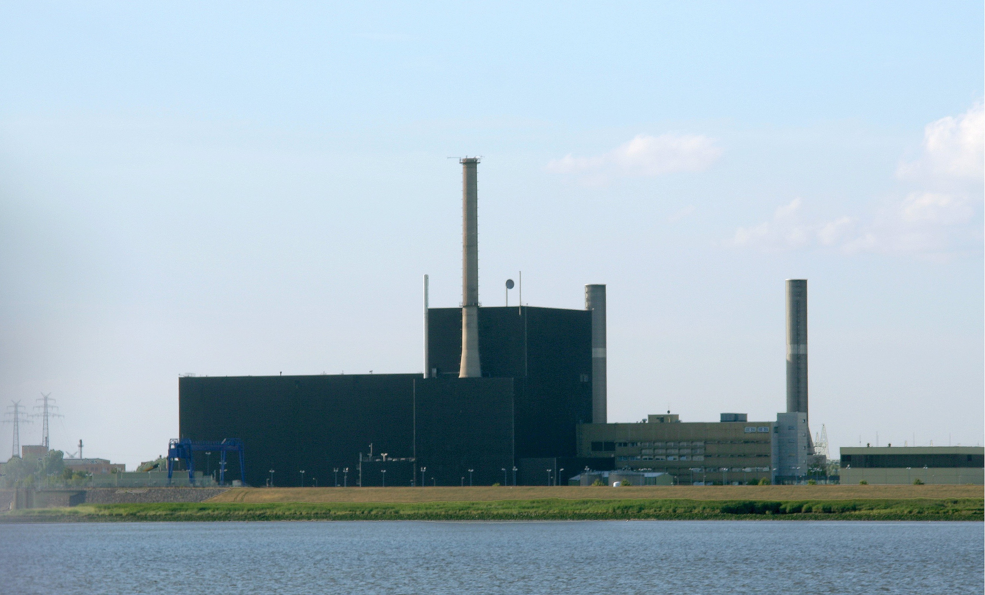 Atomkraftwerk_Brunsbüttel von der Elbe aus gesehen